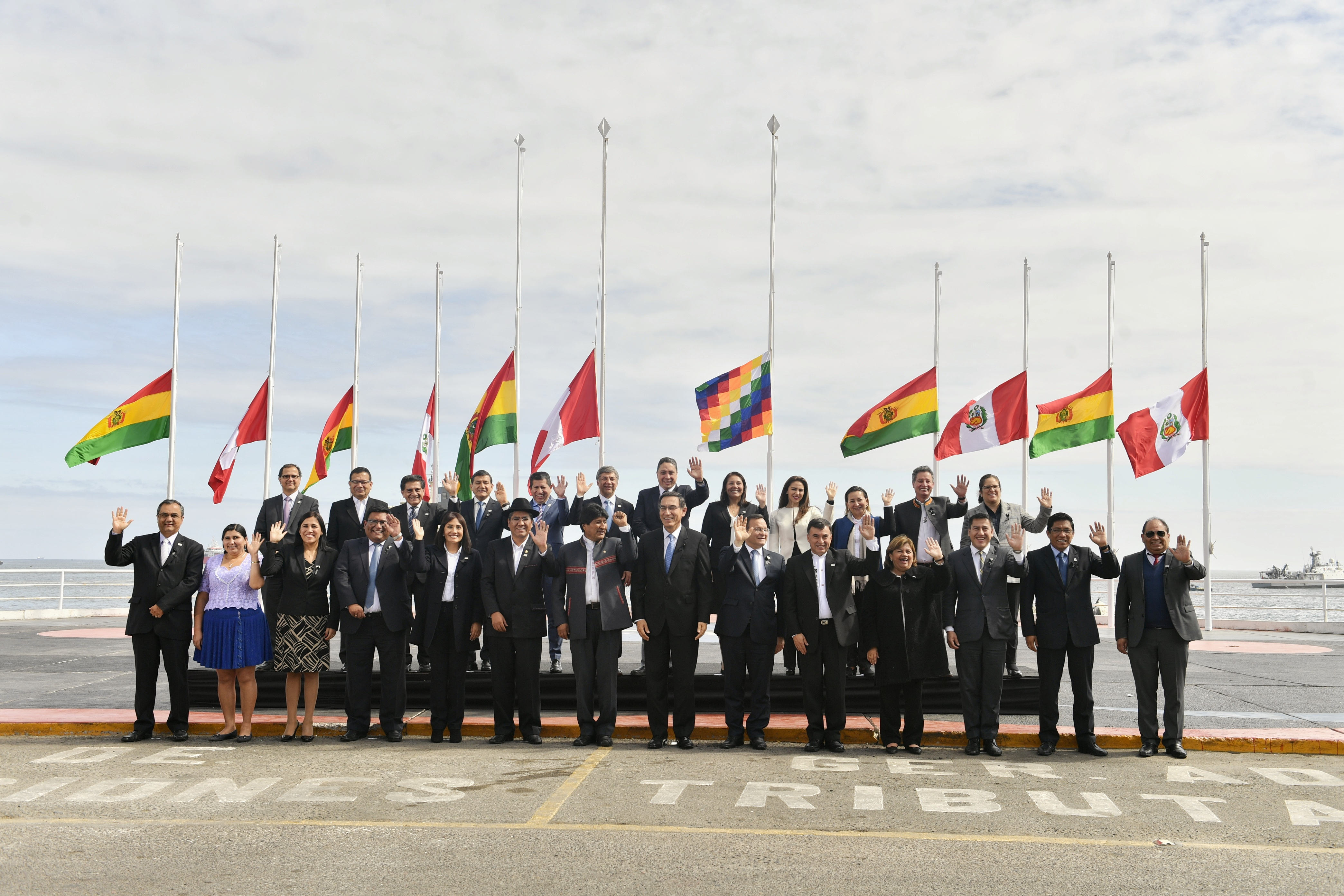 Encuentro Presidencial y V Gabinete Binacional Perú-Bolivia.